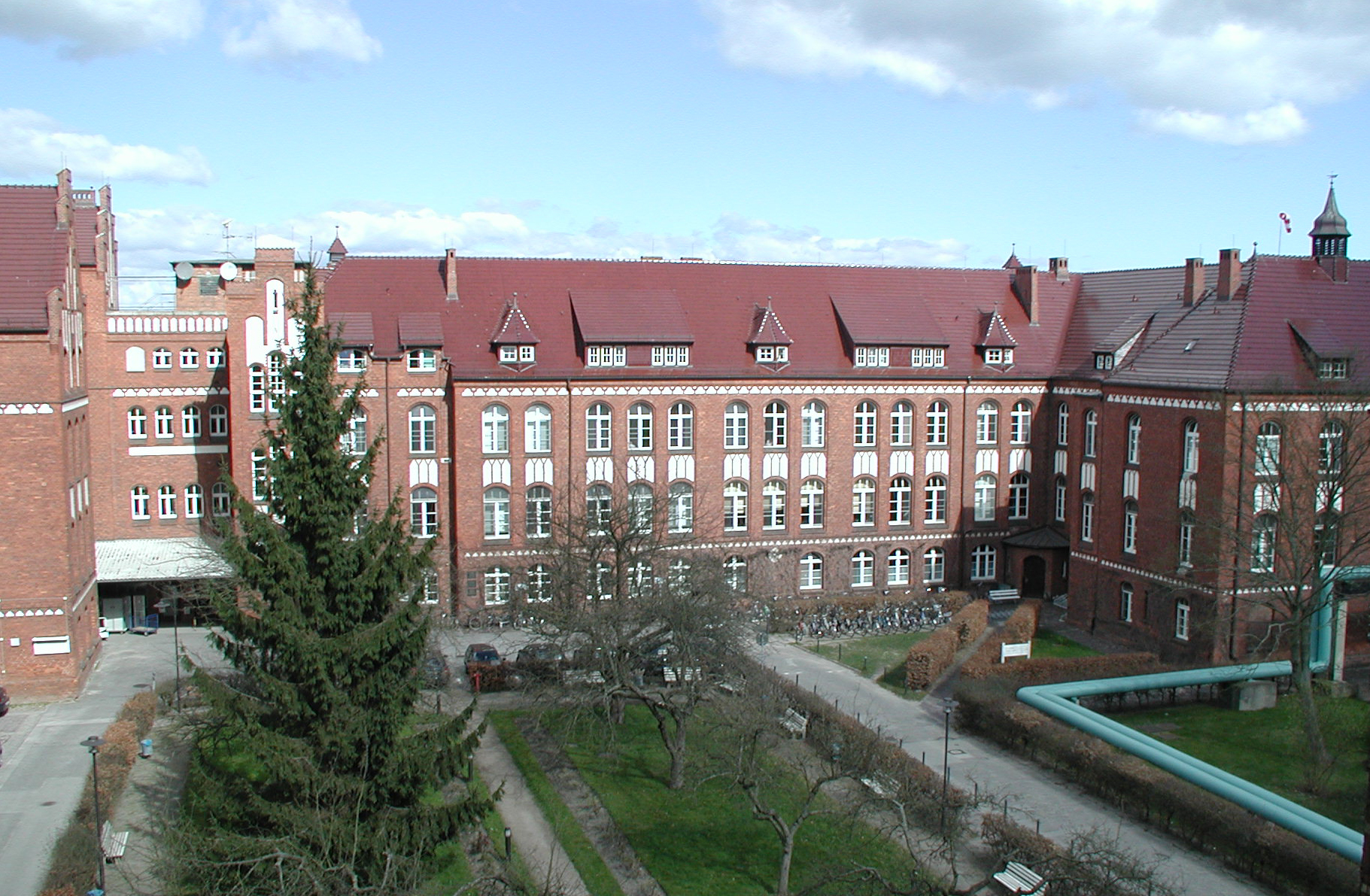 Institut für Anatomie der Universität Greifswald